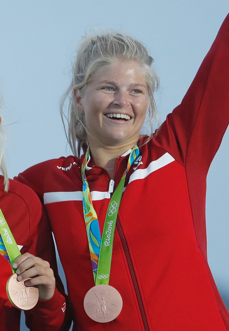 Rio de Janeiro - As brasileiras Martine Grael e Kahena Kunze conquistaram o ouro na classe 49er FX da vela dos Jogos Olímpicos Rio 2016, na regata final na Baía de Guanabara (Fernando Frazão/Agência Brasil)